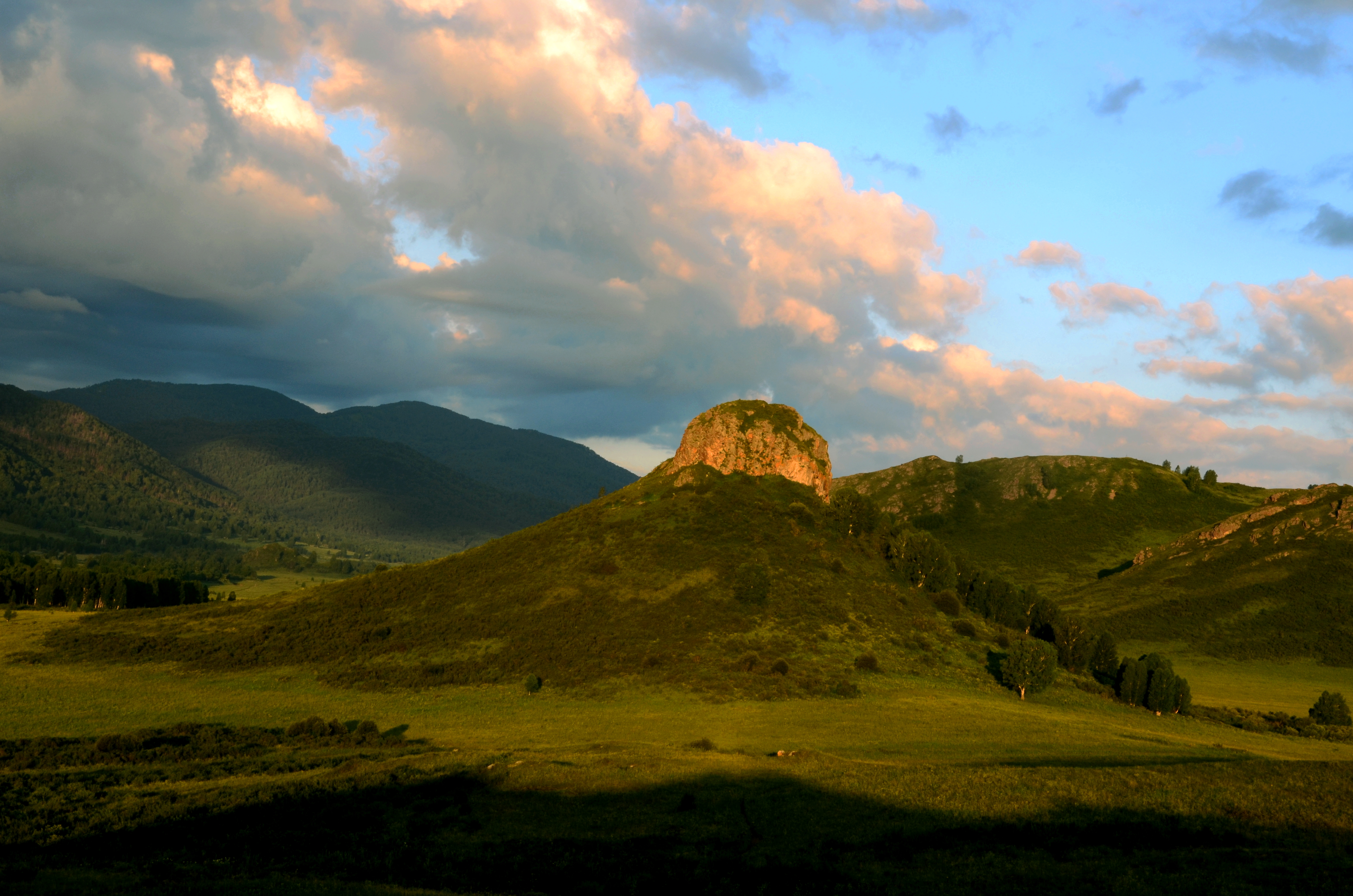 Тигирекский заповедник: в западном Алтае на водоразделе между притоками р. Чарыш и в верховьях р. Алей, на территории Змеиногорского, Третьяковского и Краснощековского районов на границе с Казахстаном, в 30 км к югу от пос. Чинета и 70 км к западу от с. Змеиногорск, Змеиногорский район, Алтайский край This image is related to the protected area of Russia number 2200057